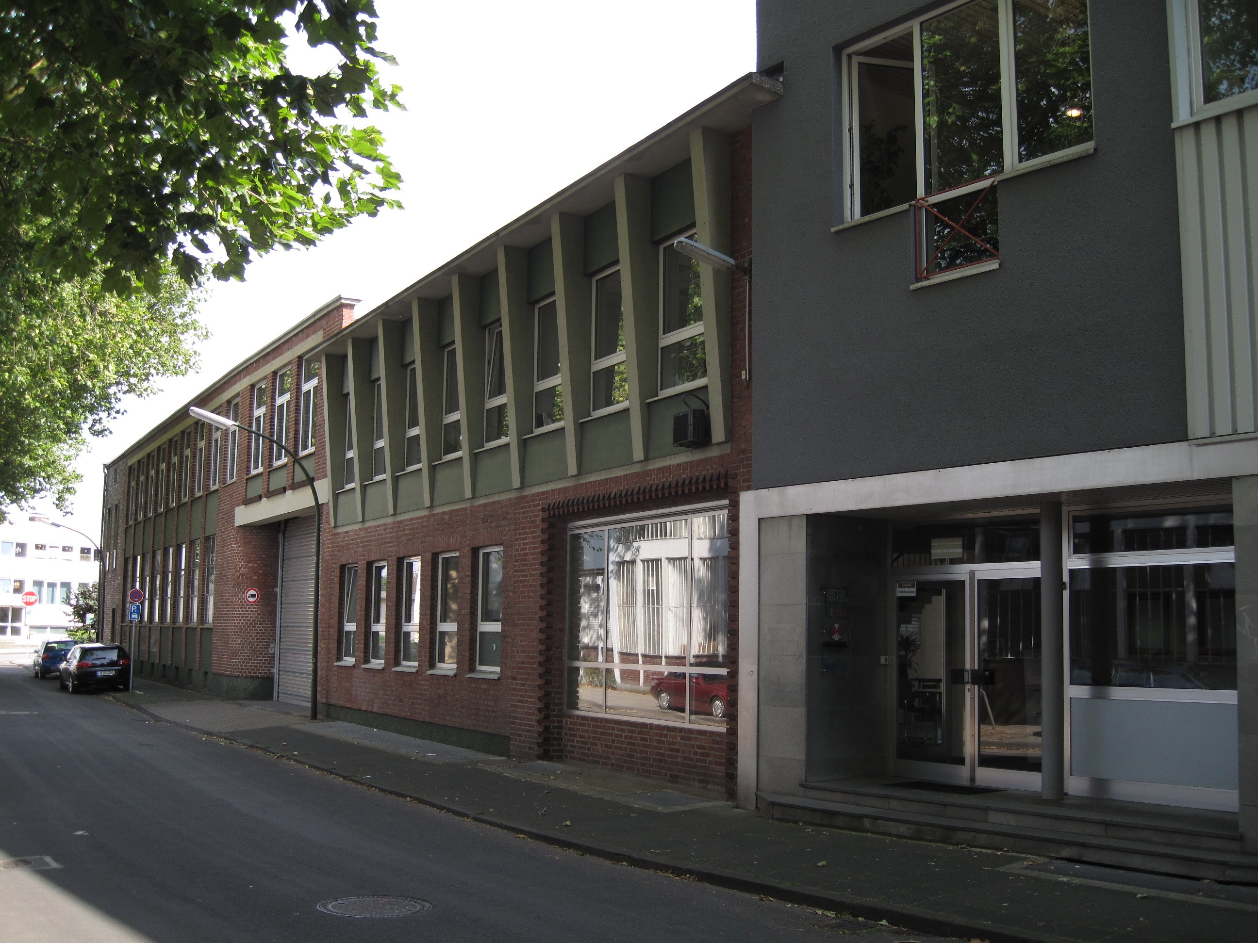 Fabrikgebäude Hänsel Textil in Iserlohn.